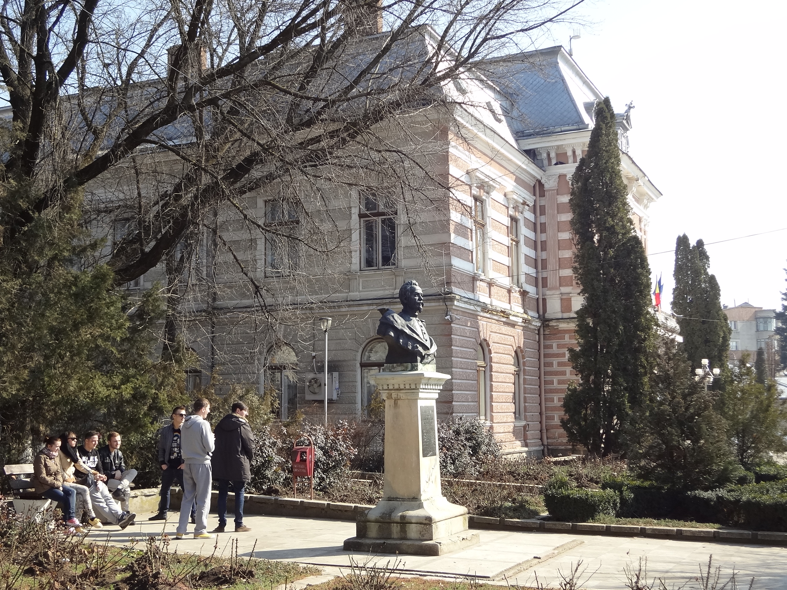 Falticeni parc de la mairie 1